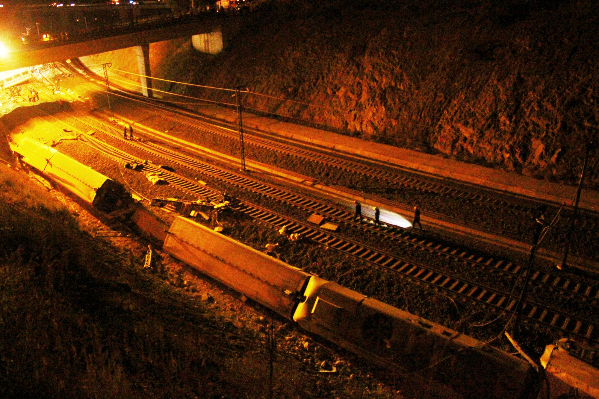 Fotos que hice in situ del accidente ferroviario ocurrido este 24 de julio cerca de Santiago de Compostela. En el momento de escribir estas líneas ya se cuentan 65 muertos. Es el peor accidente ferroviario de España en los últimos 40 años. Tragedy in Santiago de Compostela Photos I made on-site of the train crash on July 24 near Santiago de Compostela. At the time of writing are counted 65 dead. It is the worst rail accident in Spain in the last 40 years.